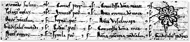 Firmas de Don Pedro Froilaz y su familia - Froilaz de la donación hecha por Don Rodrigo Froiláz Almirante.